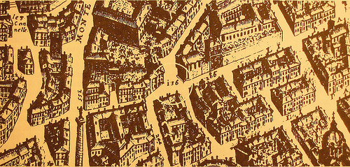 Largo di Campo Carleo in Giovanni Battista Falda's Map (1676)